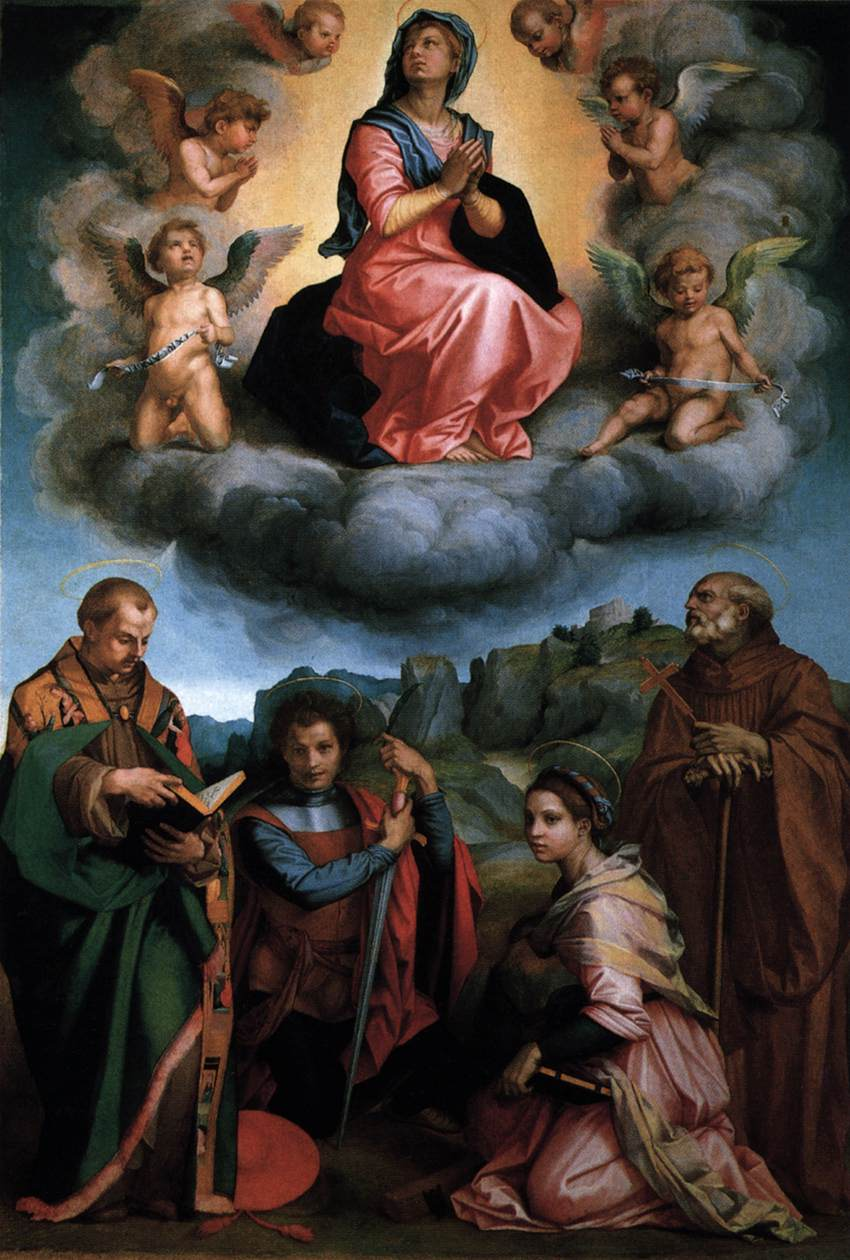 Poppi Altarpiece